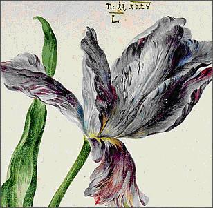 Aquarell aus dem "Karlsruher Tulpenbuch". Papier; Karlsruhe; um 1730 Badische Landesbibliothek, Cod. KS Nische C 13, Blatt 35 (Ausschnitt)